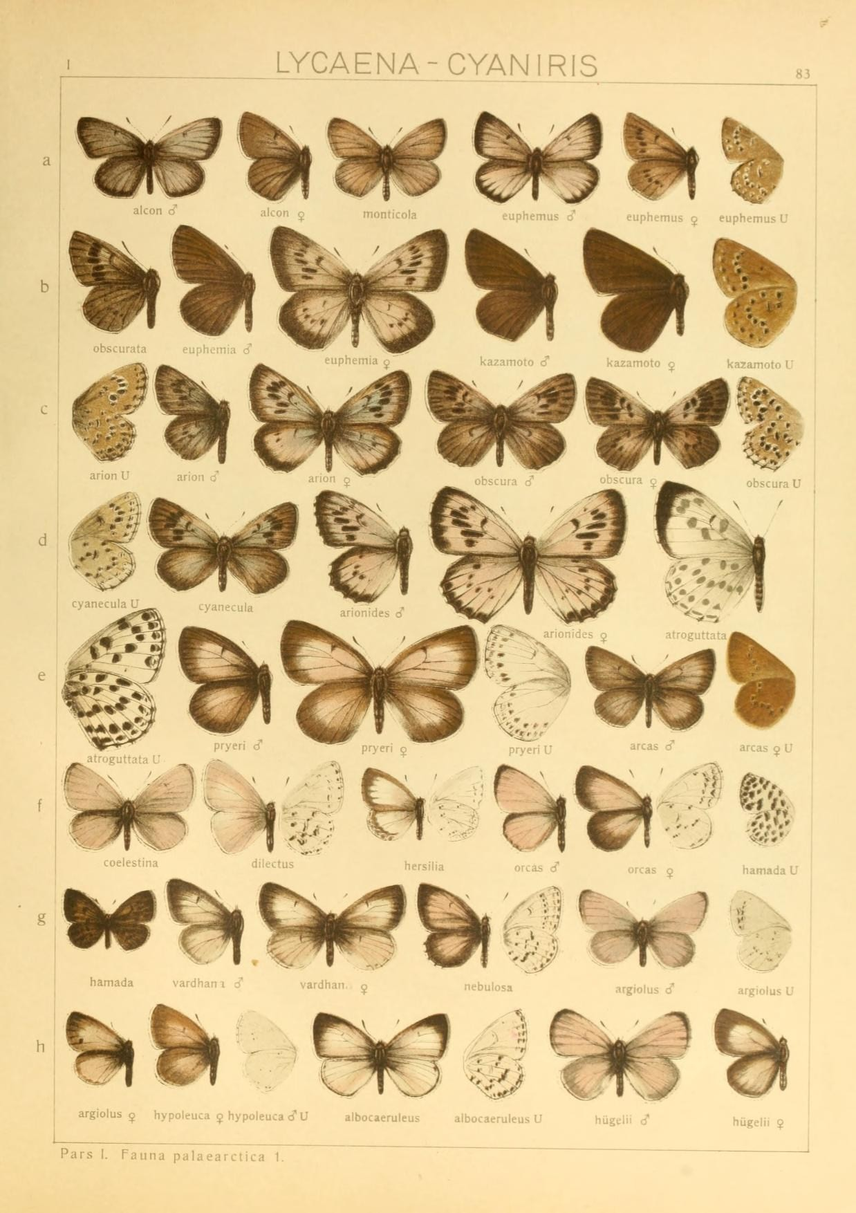 LYCAENA- CYAN IRIS atrcigutt:ila V "J argiolus 5 hypoleuca 9 hypuieu.a o' U albocacruleii. .iibuc3iTuk-u. 1 ' Pars I. Fauna palac